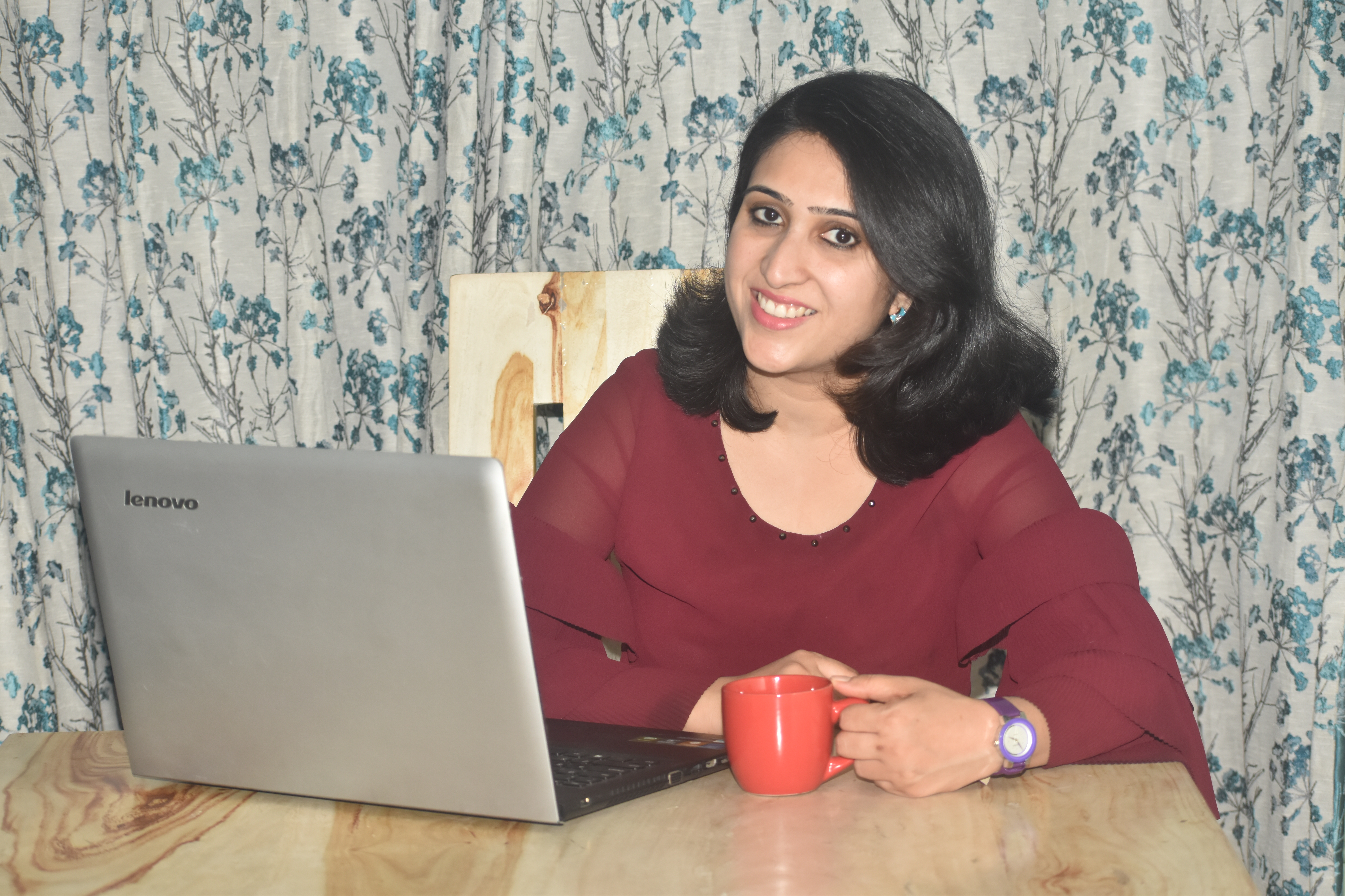 Fiji Hindi: Yeh ek bhartiya lekhika ki photo hai